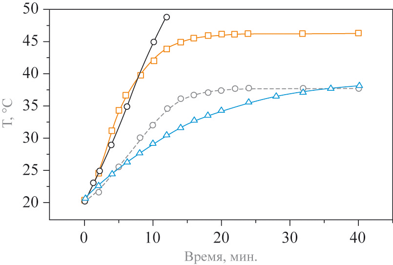 "Smart" power converters frequency radiation into heat without any control from the outside stop their heating at a certain level, while continuing to be in the high-frequency magnetic field. Typically, this is due to the transition of the material at a certain temperature transducer of the ferromagnet in the paramagnetic state (the Curie temperature), which is not heated in the magnetic field. The figure - the dynamics of the temperature of suspensions containing particles of different magnetic materialovreobrazovateley on the time they are in a magnetic field. Straight line - temperature suspension of "normal" converter // «Умные» преобразователи энергии высокочастотного излучения в тепло без контроля извне останавливают свой нагрев на определенном уровне, продолжая находиться в высокочастотном магнитном поле. Как правило, это связано с переходом материала преобразователя при определенной температуре из состояния ферромагнетика в парамагнетик (температура Кюри), который уже не нагревается в магнитном поле. На рисунке — динамика температуры суспензий, содержащих частицы различных магнитных материаловреобразователей, от времени их нахождения в магнитном поле. Прямая линия — температура суспензии, содержащей «обычный» преобразователь